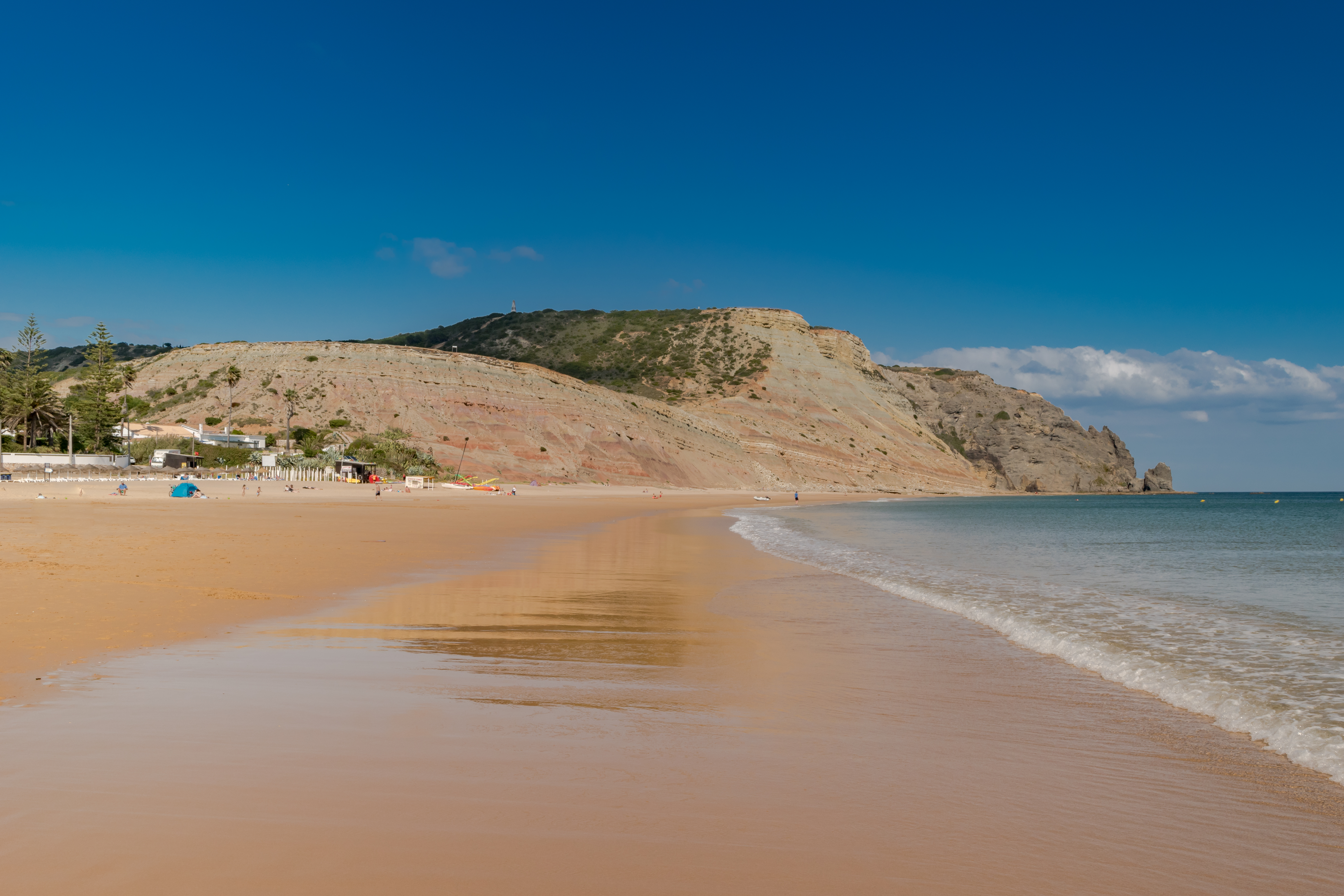 Praia da Luz ist ein ehemaliges Fischerdorf mit einem traumhaften Sandstrand.